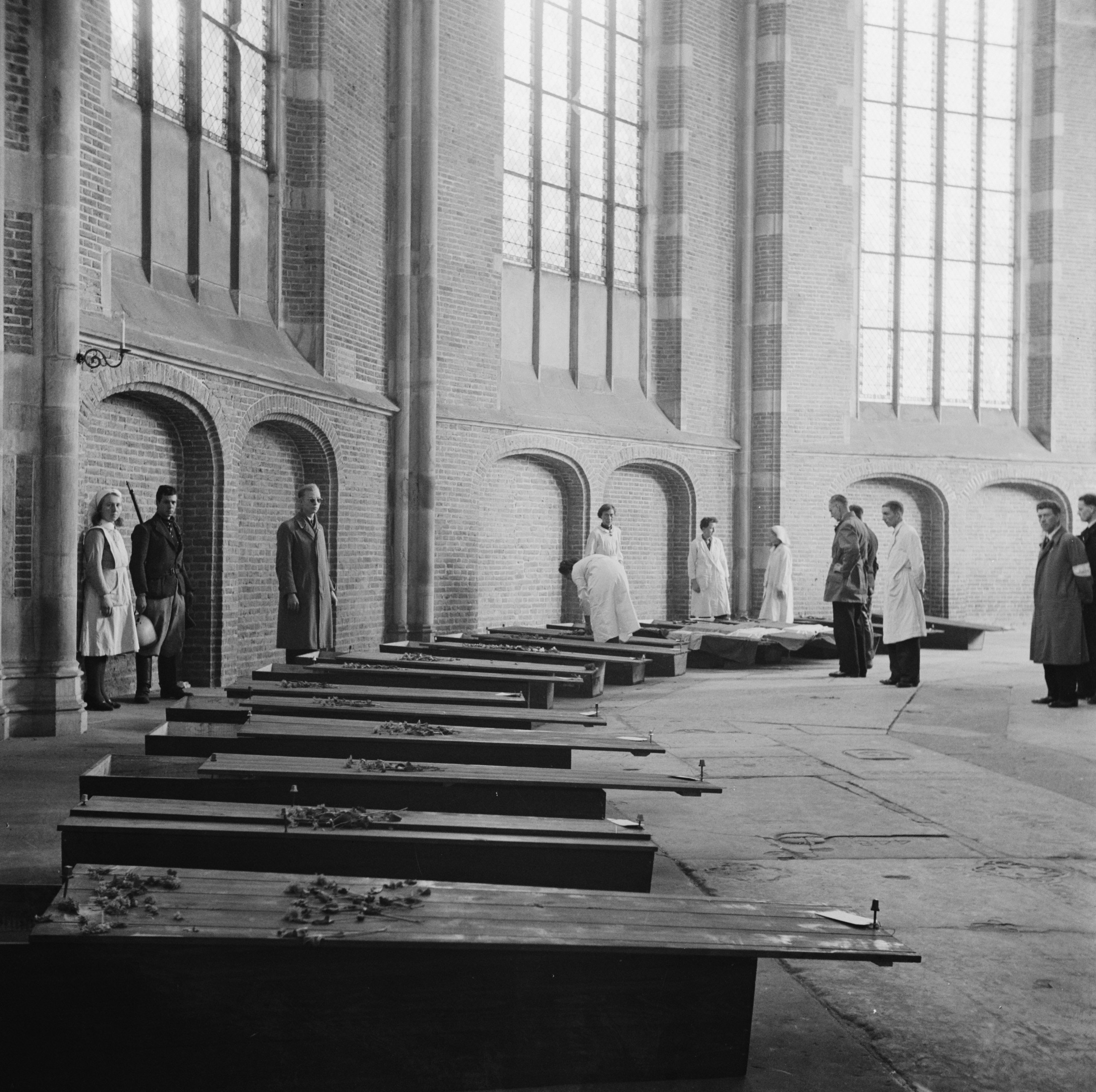 Collectie / Archief : Fotocollectie Anefo Reportage / Serie : Front Noord-Oost Nederland: Deventer Beschrijving : Opgebaarde slachtoffers en verzetsstrijders in de Grote Kerk van Deventer. Verpleegsters leggen de Nederlandse driekleur over de kisten. Enkele familieleden zijn ter identificatie aanwezig Datum : 11 april 1945 Locatie : Deventer, Overijssel Trefwoorden : bevrijding, verzetsstrijders Fotograaf : Poll, Willem van de / Anefo, [onbekend] Auteursrechthebbende : Nationaal Archief Materiaalsoort : Negatief (zwart/wit) Nummer archiefinventaris : bekijk toegang 2.24.01.03 Bestanddeelnummer : 900-2475